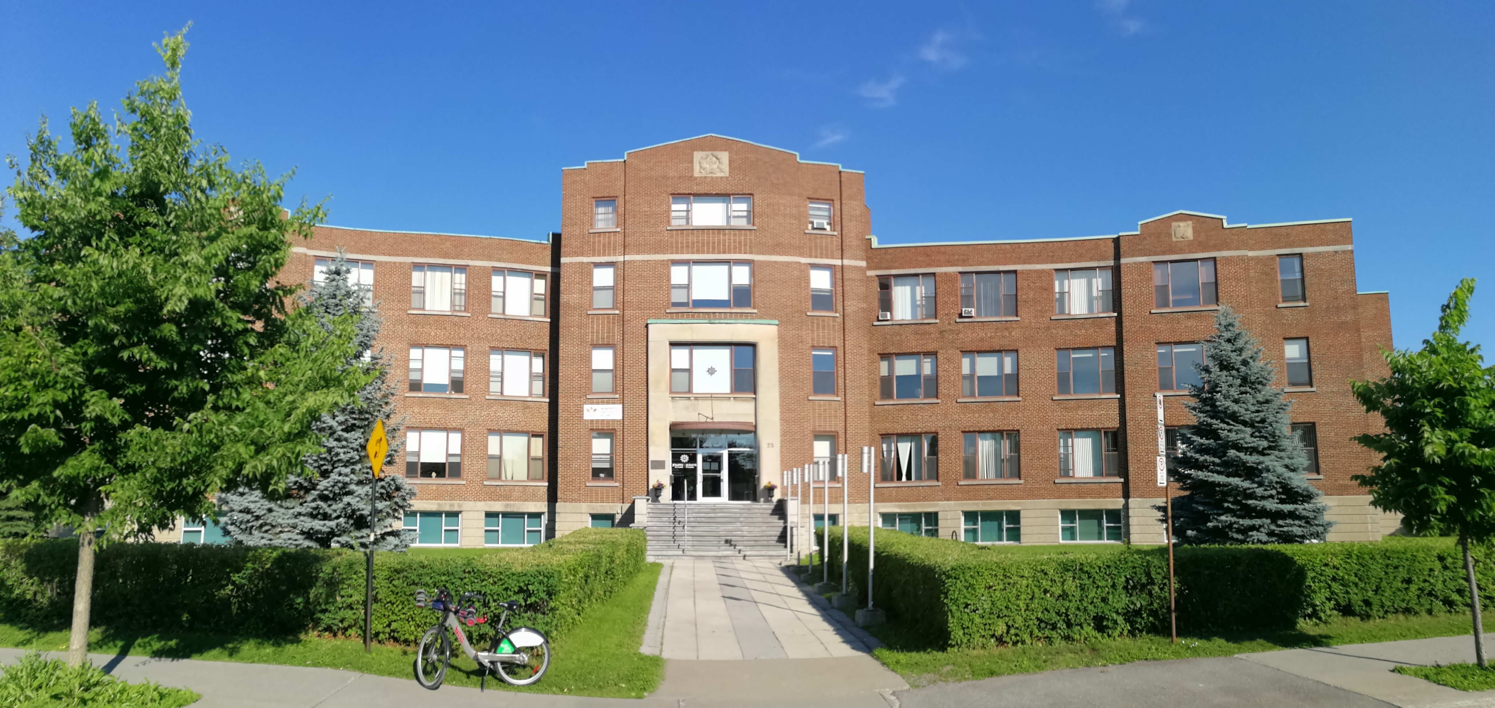 Centre justice et foi, centre d'analyse sociale fondé par les jésuites, à Montréal